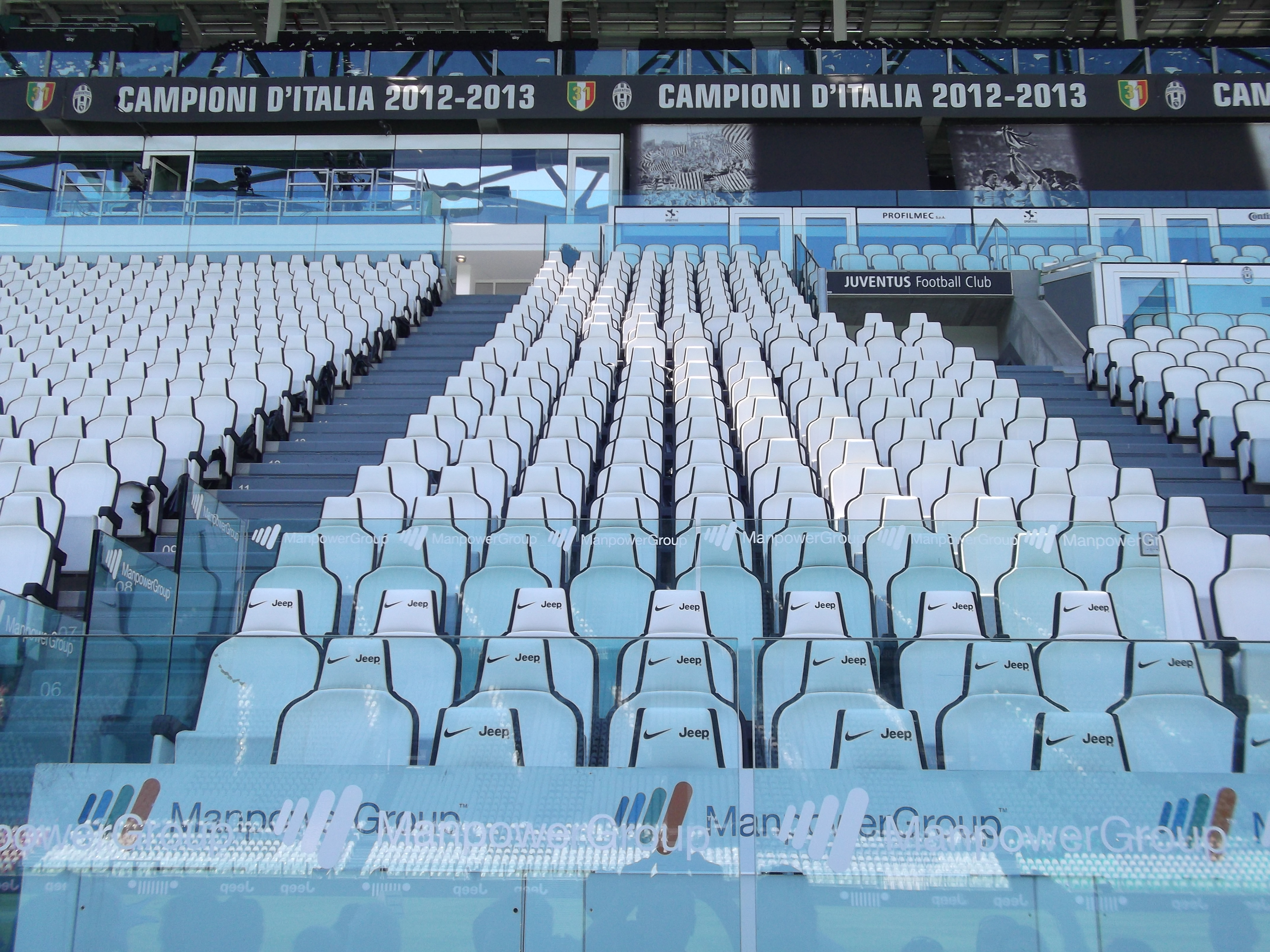 panchina Juve